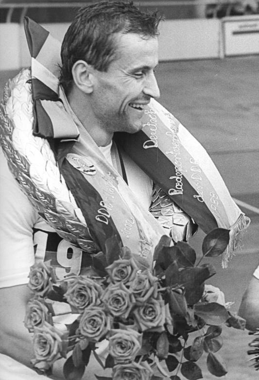 Lutz Heßlich ADN-ZB Weisflog 9.7.88 Cottbus: DDR-Bahnradsport-Meisterschaften - Auf der neuen mit Kunststoff belegten 333 Meter langen Bahn kam der 29jährige Olympiasieger Lutz Heßlich, sechsfacher Weltmeister, in seiner Heimatstadt zu seinen bereits zehnten Meistertitel im sprint.